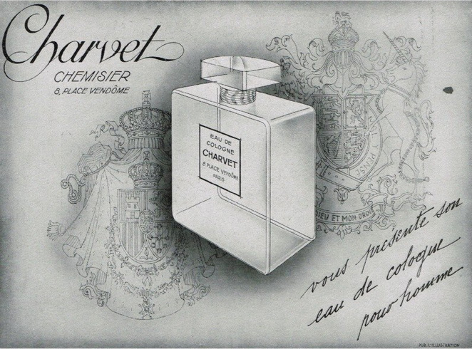 Advertisement for Charvet perfume in L'Illustration.